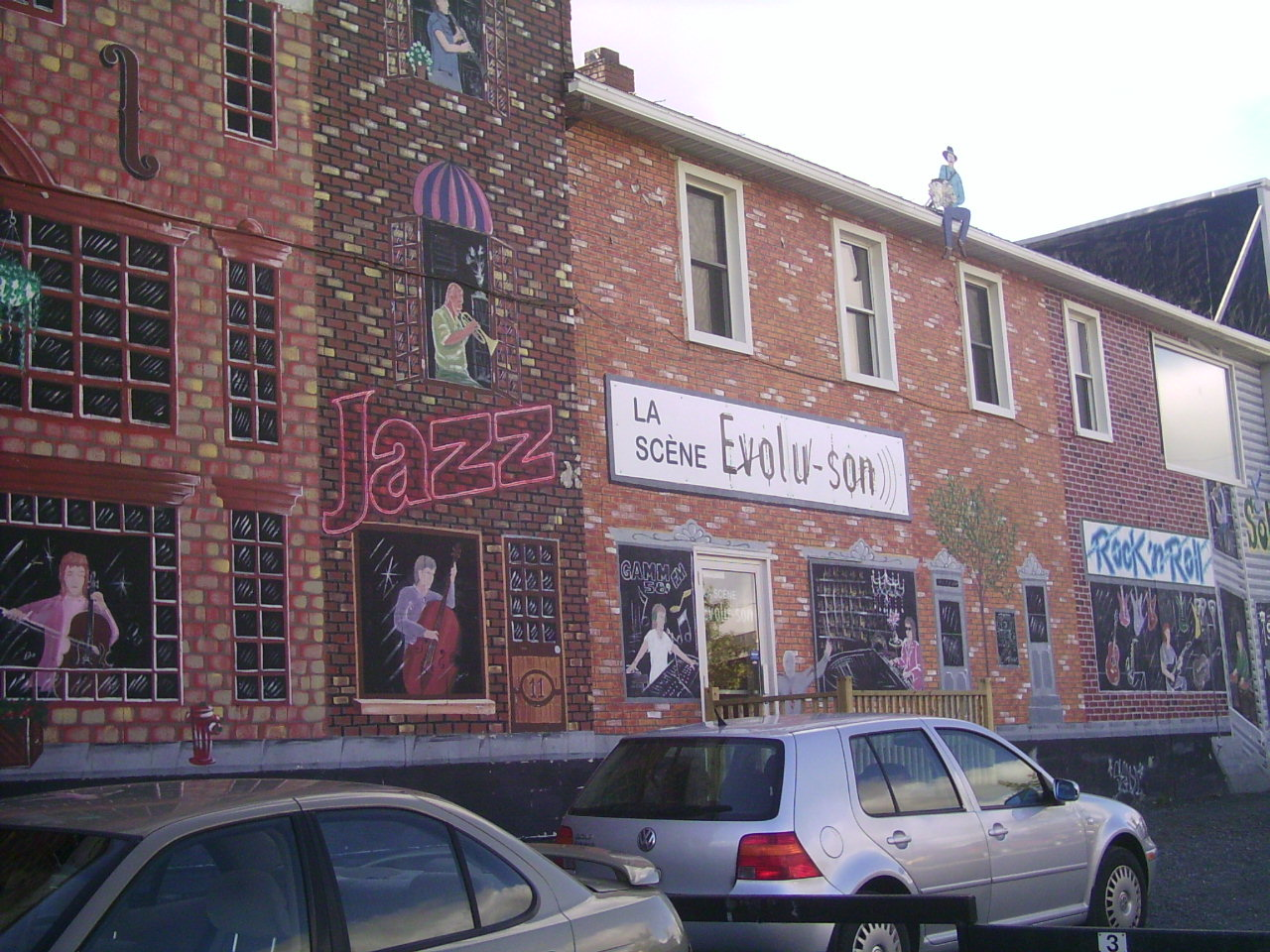 Murale à Rouyn-Noranda